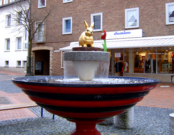 Der umstrittene Brunnen von Heinrich Brummack im Westerkappelner Ortszentrum.